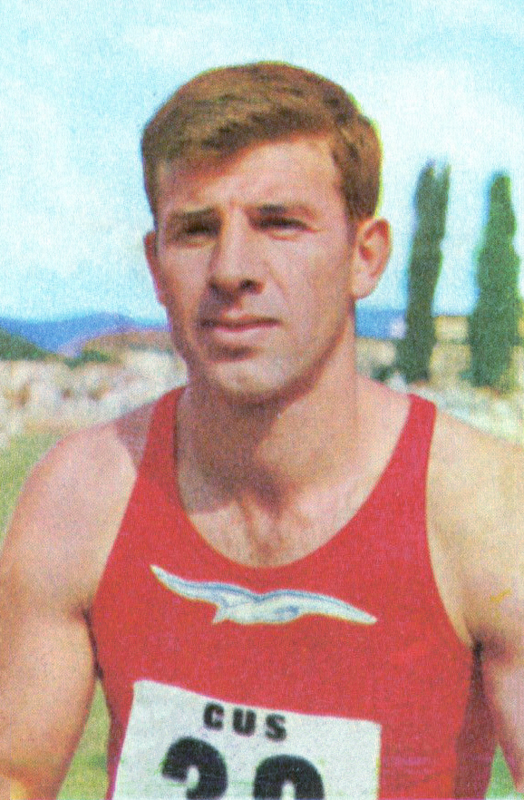 CAMPIONI DELLO SPORT 1967/68-n. 51 -OVANESIAN-ATLETICA LEG -rec